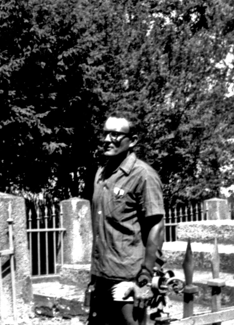 Dr. Egri Kiss Tibor, aki 30 éven át szervezte a Nemzetközi Tisza-túrát (Tiszadob)